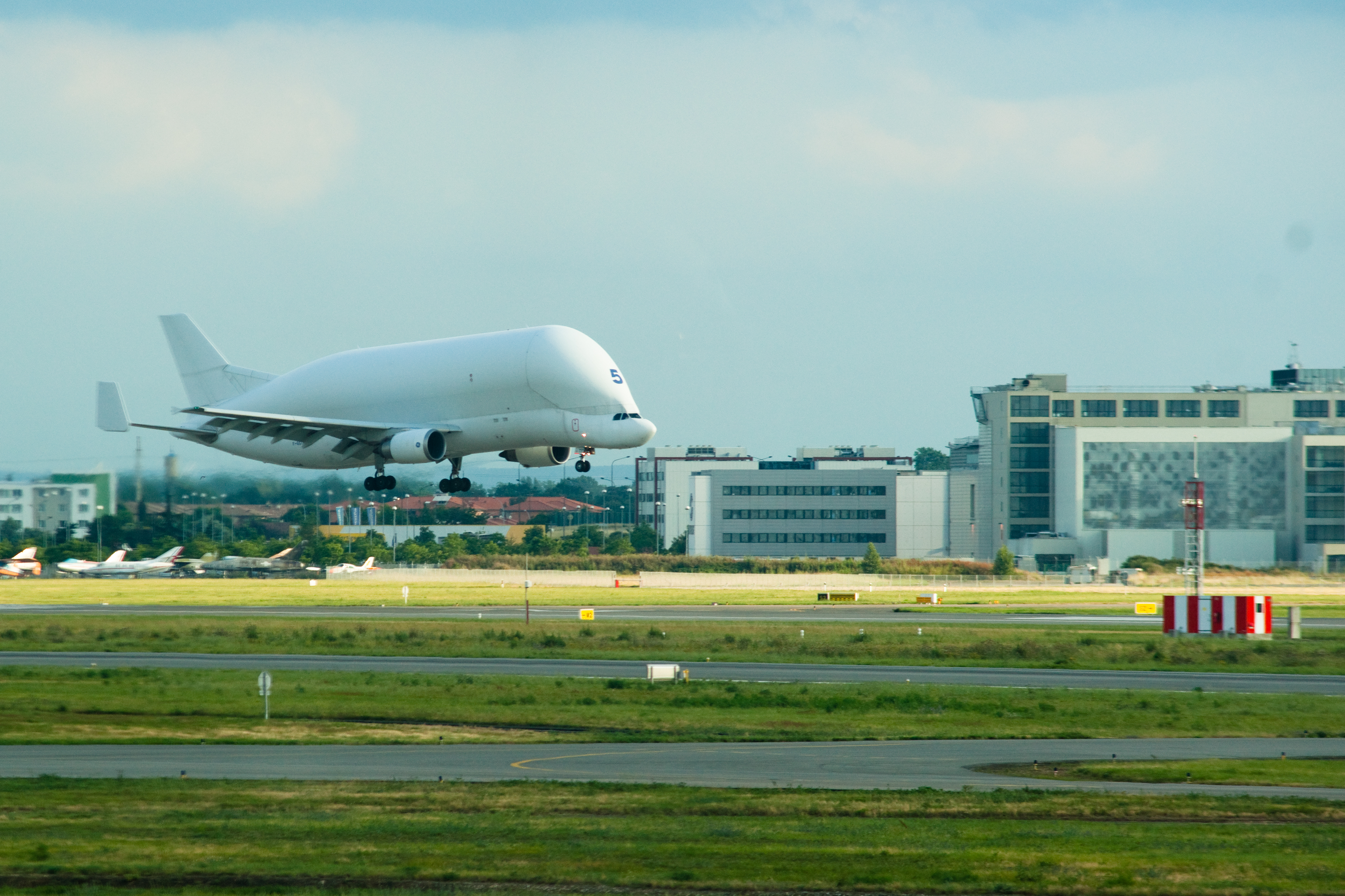 Aterrissage d'un Belouga à Toulouse Blagnac.